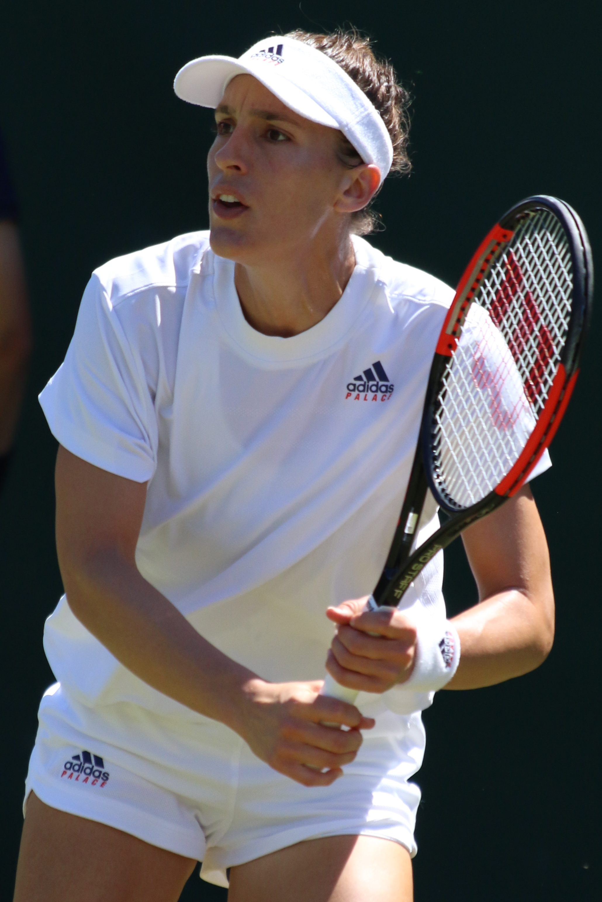 Petkovic WM18 (21)